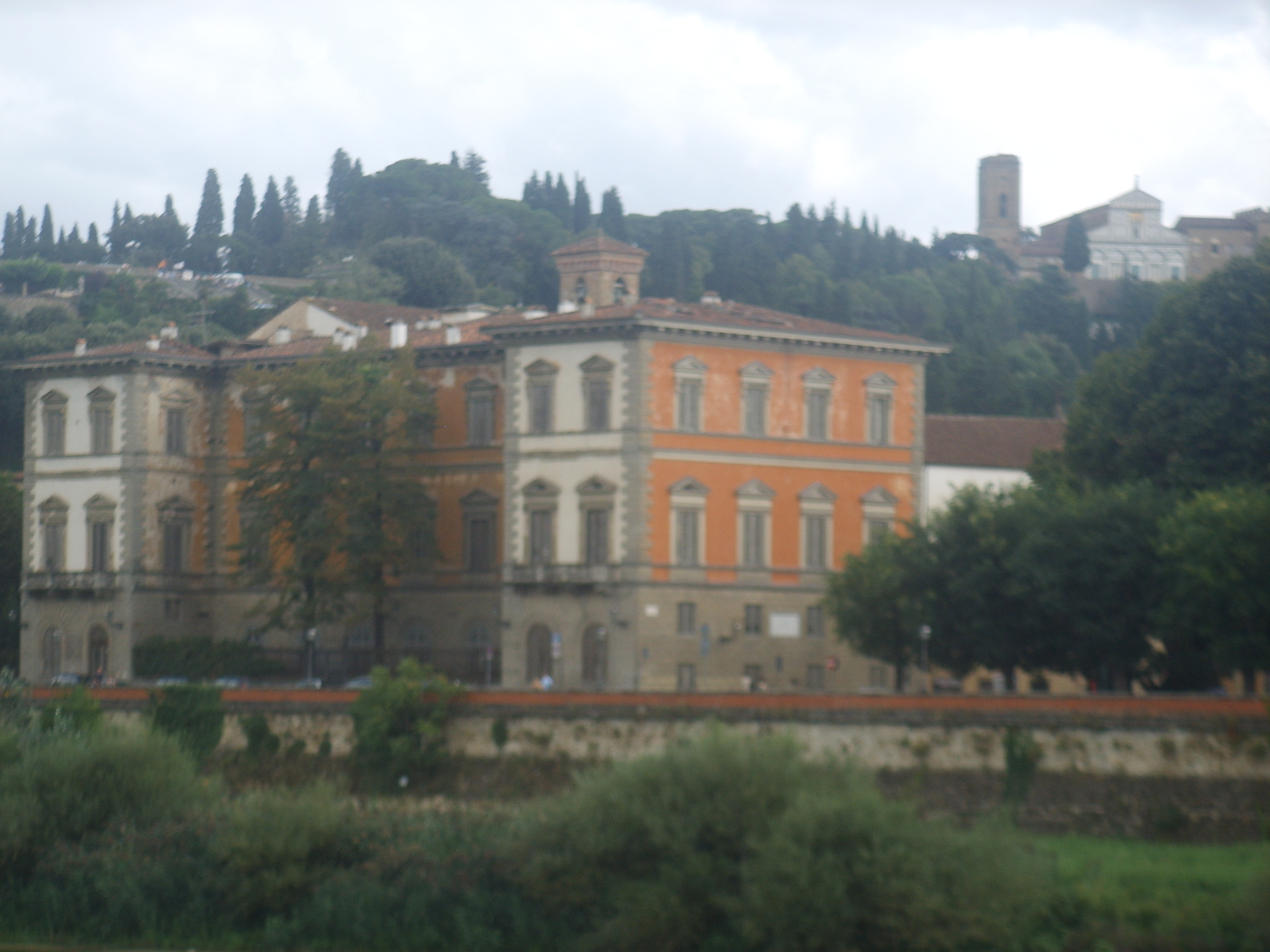 Palazzo Serristori a Firenze.